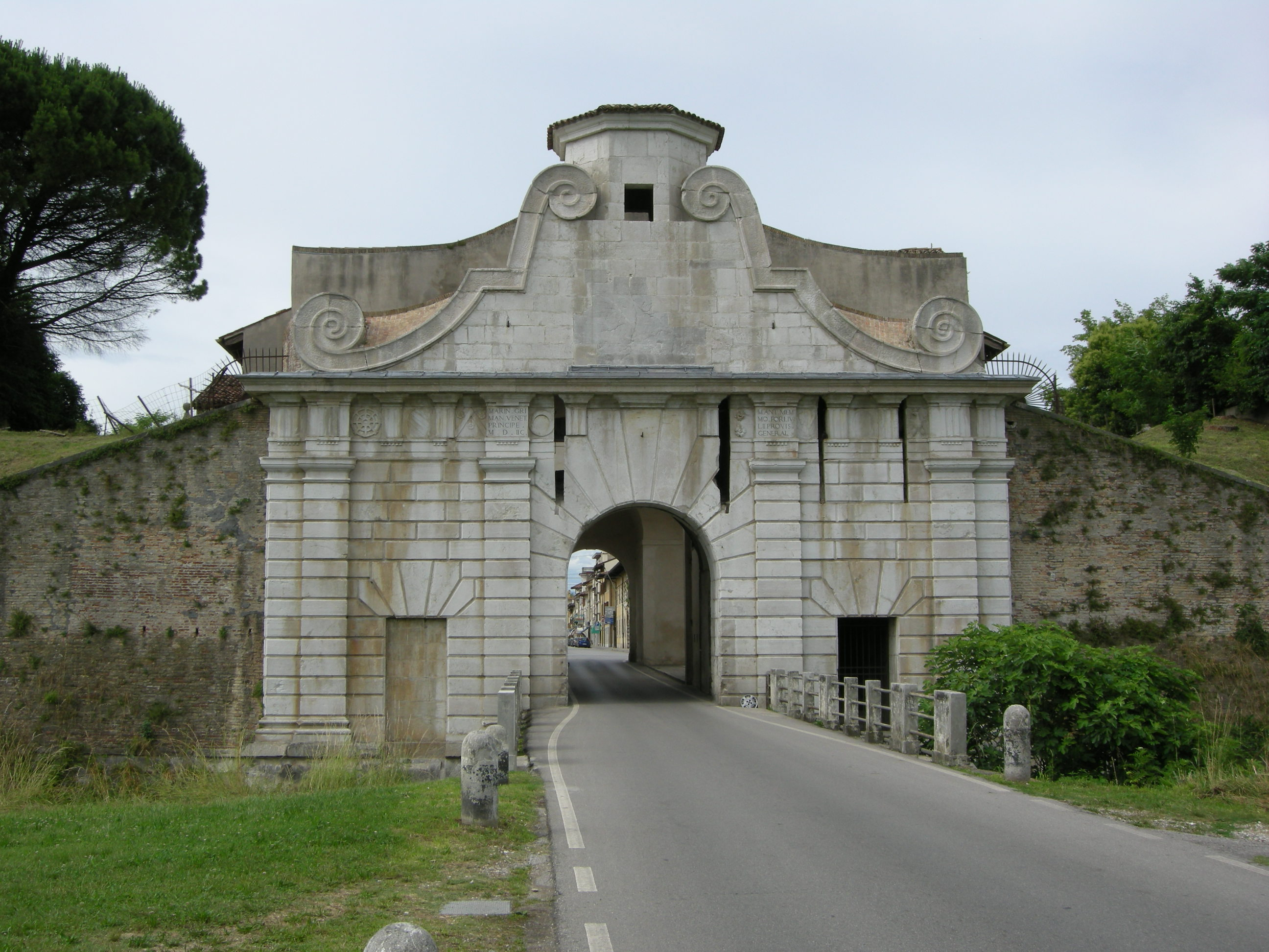 Palmanova, porta aquileia